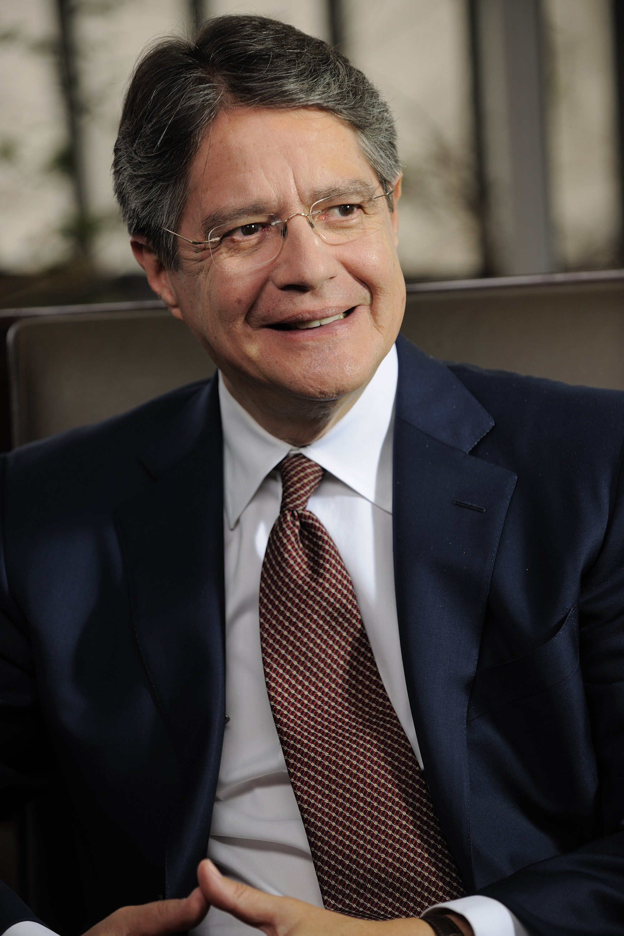 Foto de Guillermo Lasso tipo perfil